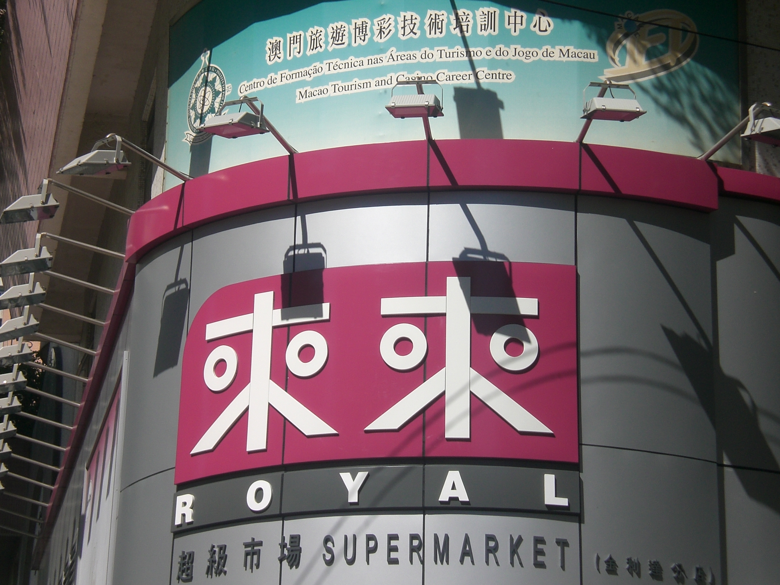 澳門來來超級市場位於氹仔金利達花園商場的分店.